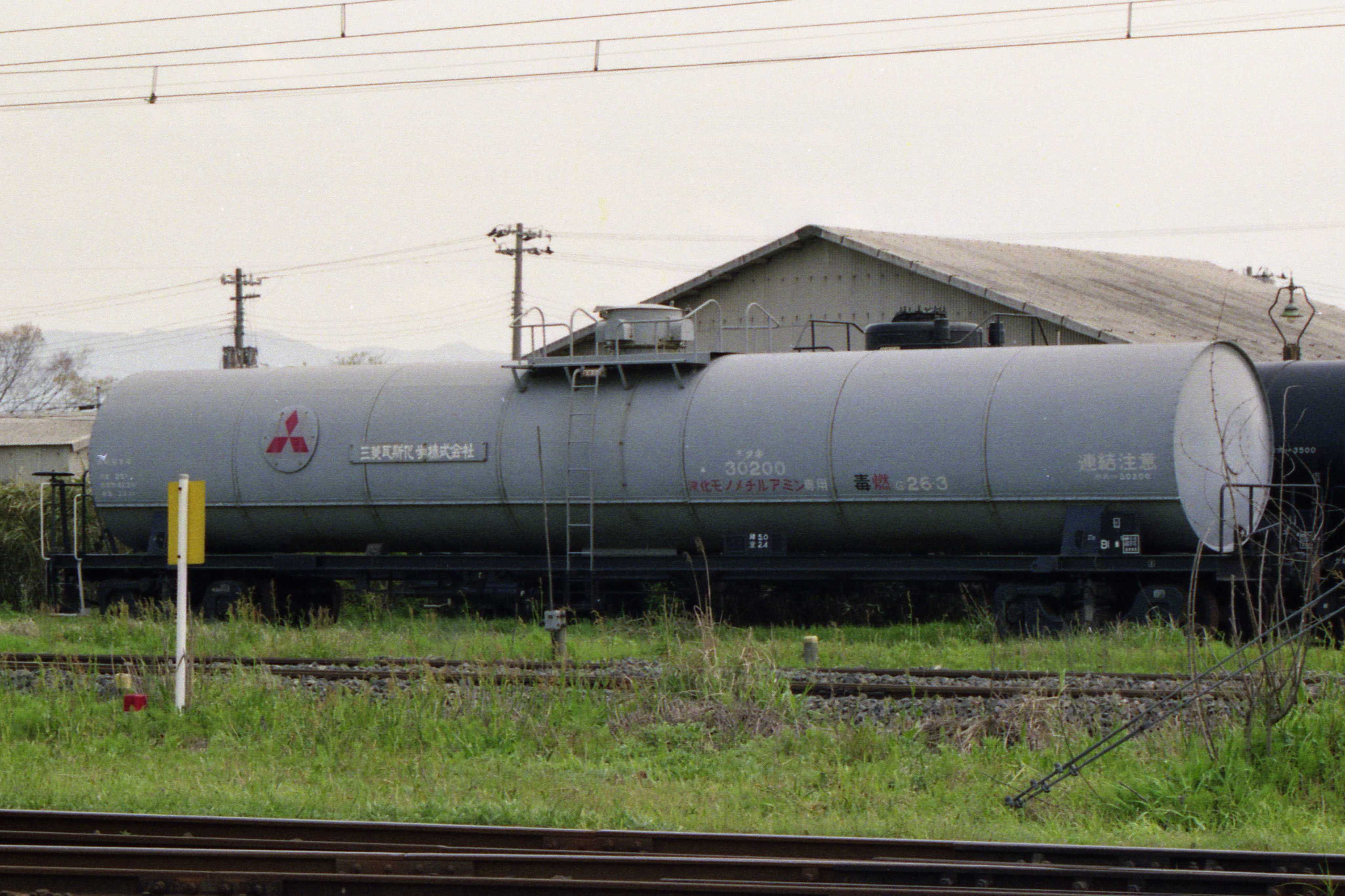 タキ30200形タキ30200。三菱瓦斯化学所有。1992年5月3日、新崎駅にて。